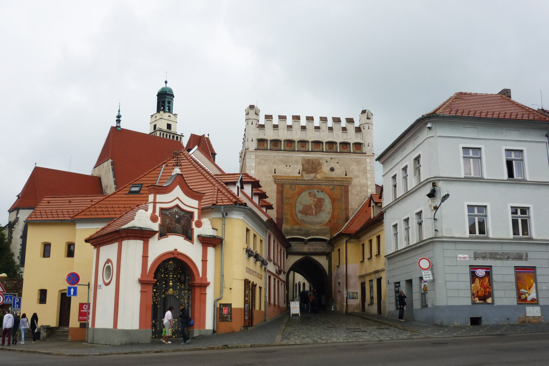 Unteres Tor oder Piseker Tor in Prachatitz (Prachatice)